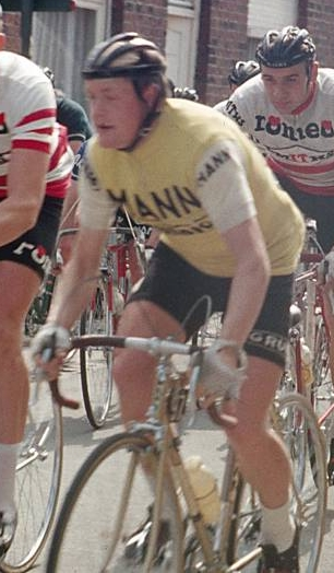 Willy Van Neste in een Belgische koers (1967)